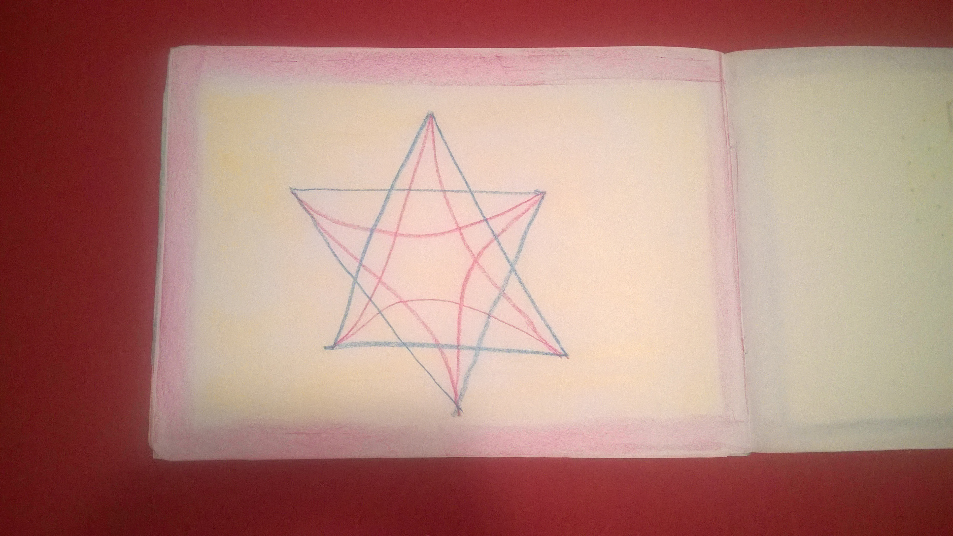 Jednoduché formy - waldorská škola - 1. třída - epochový seši